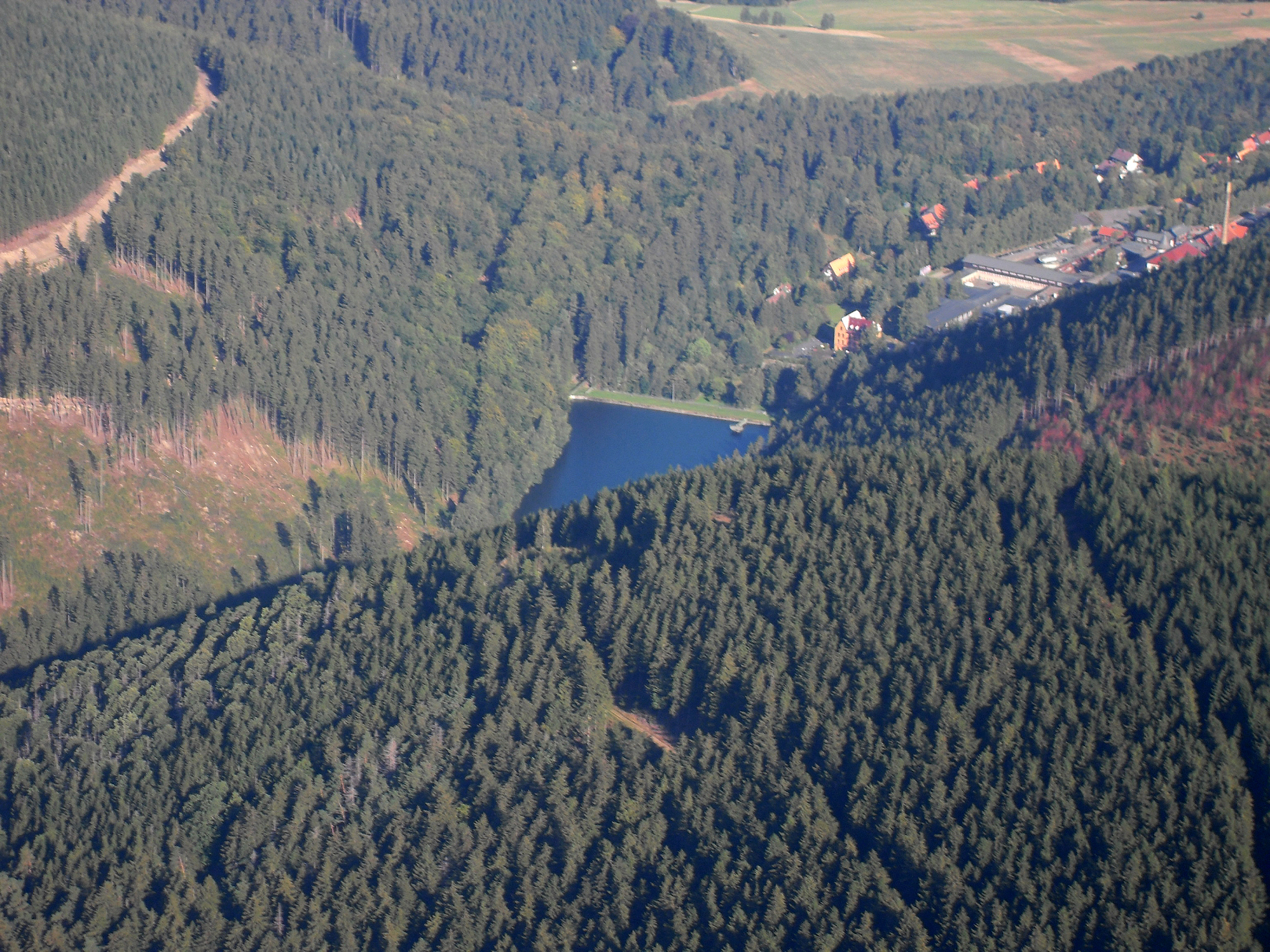 Herzberger Teich südlich von Goslar. Im Hintergrund rechts das Erzbergwerk Rammelsberg